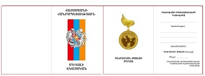 Ծնողական փառքի մեդալի վկայական